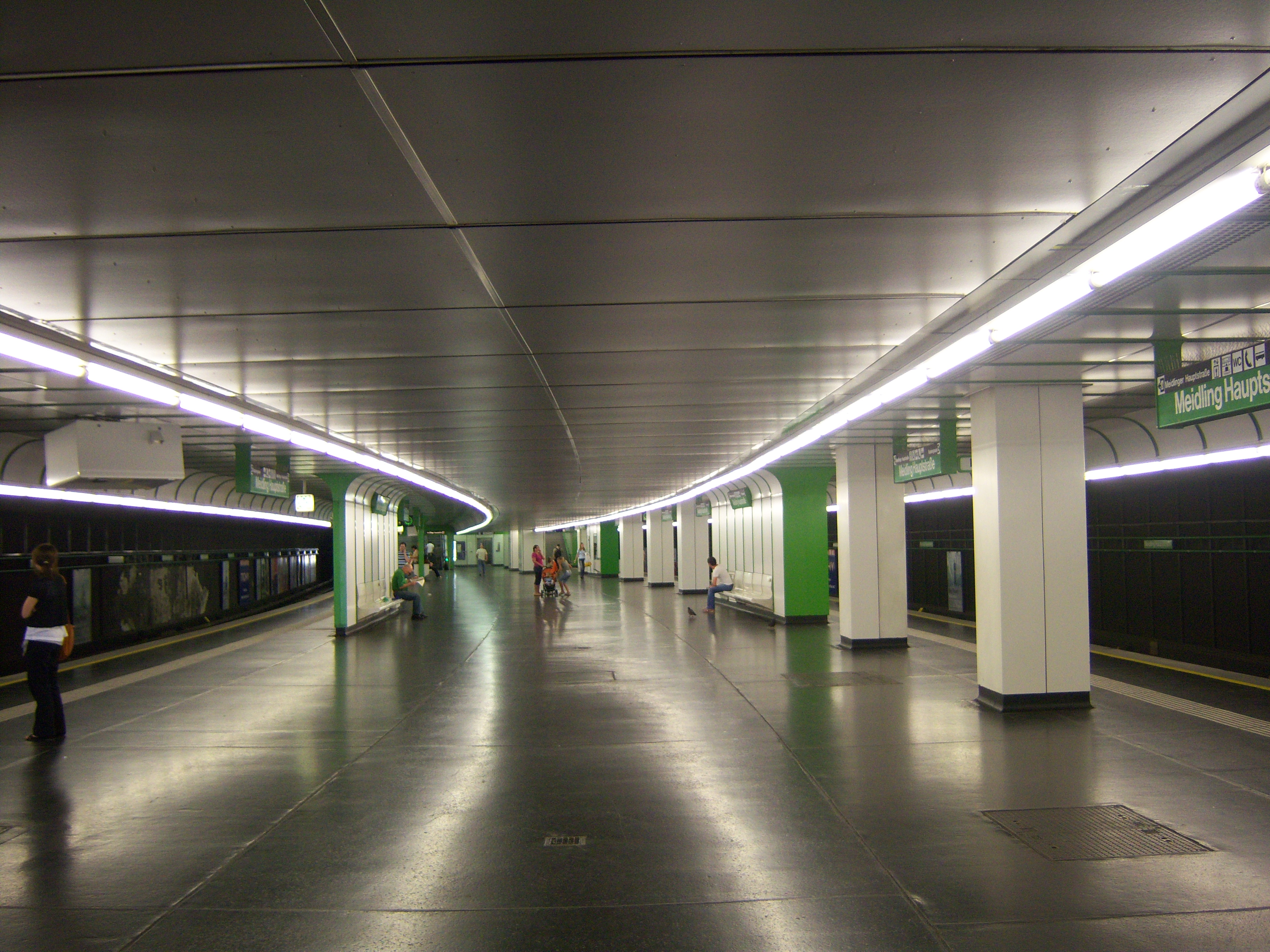 U4-Station Meidling Hauptstraße